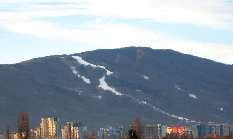 Pohorje, Slovenija Foto Andrejj, 2004